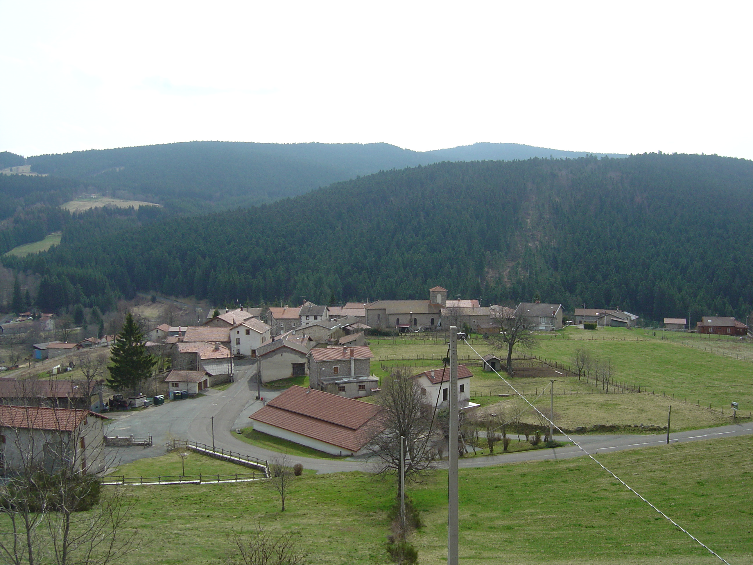 Village de la Chambonie (42) dans le Haut-Forez, à la limite entre le département de la Loire et celui du Puy-de-Dôme